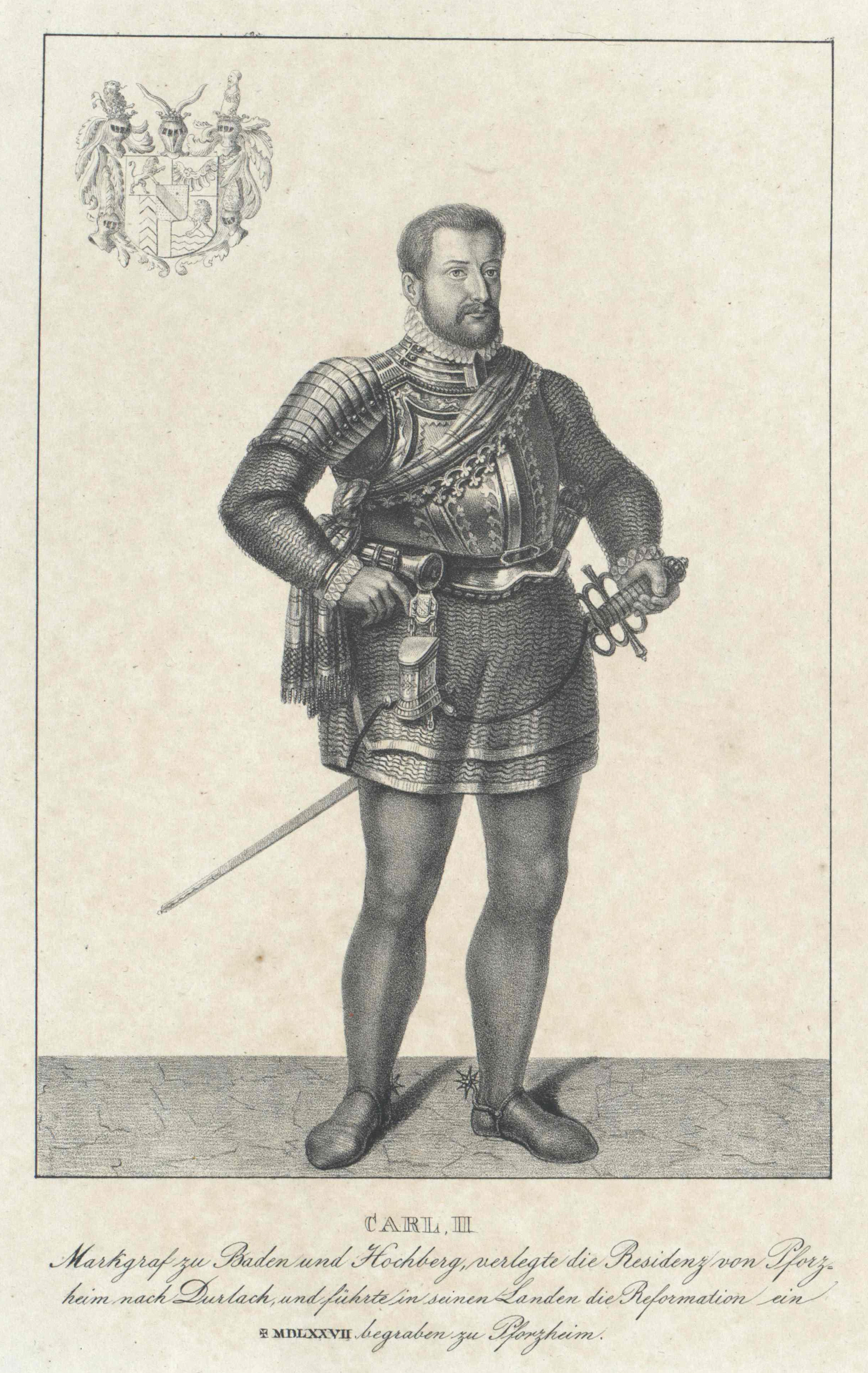 Markgraf Karl II. von Baden-Durlach, Wien, Österreichische Nationalbibliothek, Bildarchiv und Grafiksammlung, Porträtsammlung, Inventar-Nr. PORT_00060155_01